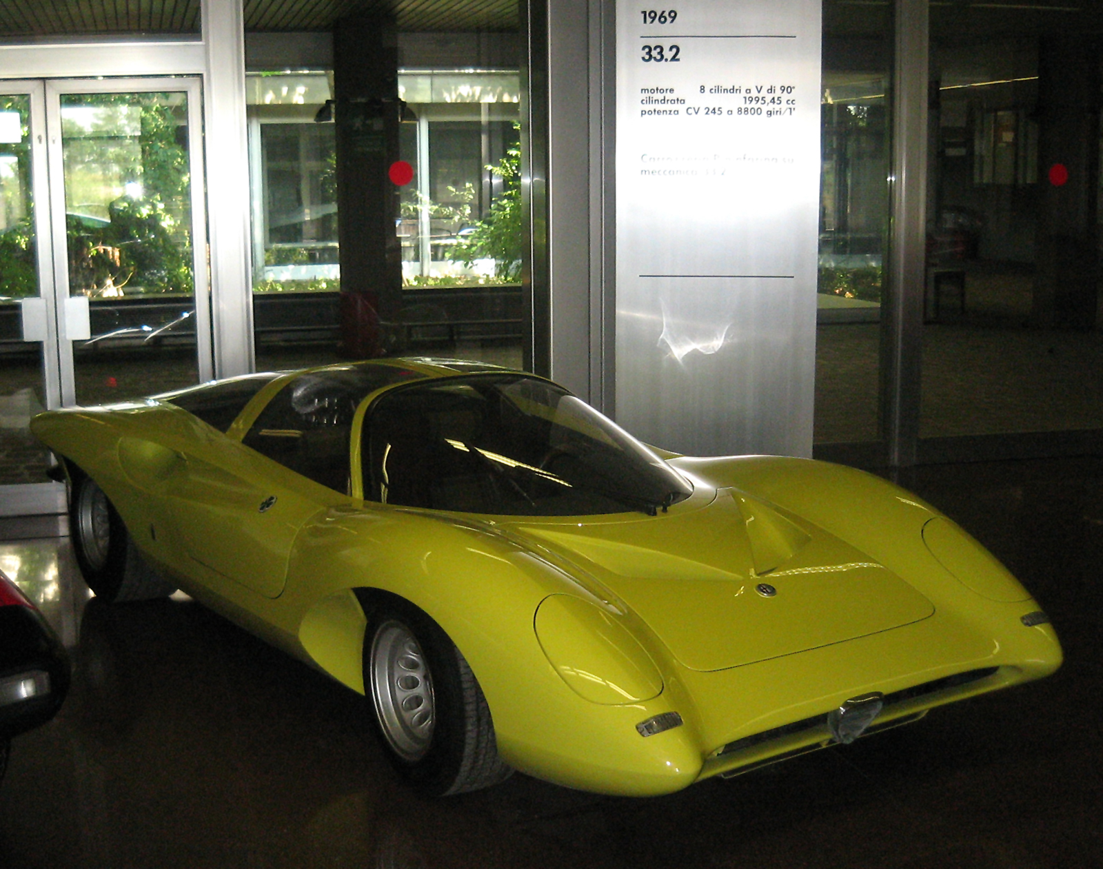 Alfa Romeo 33.2 concept car